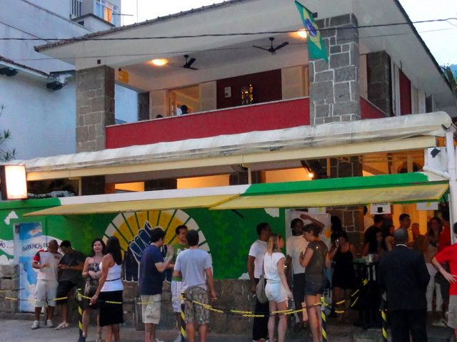 Boteco Salvação, situado na Rua Henrique de Novaes, Botafogo, Rio de Janeiro, Brasil. Esta foto foi tirada para ser incorporada ao site e disponibilizada ao público sem restrições.